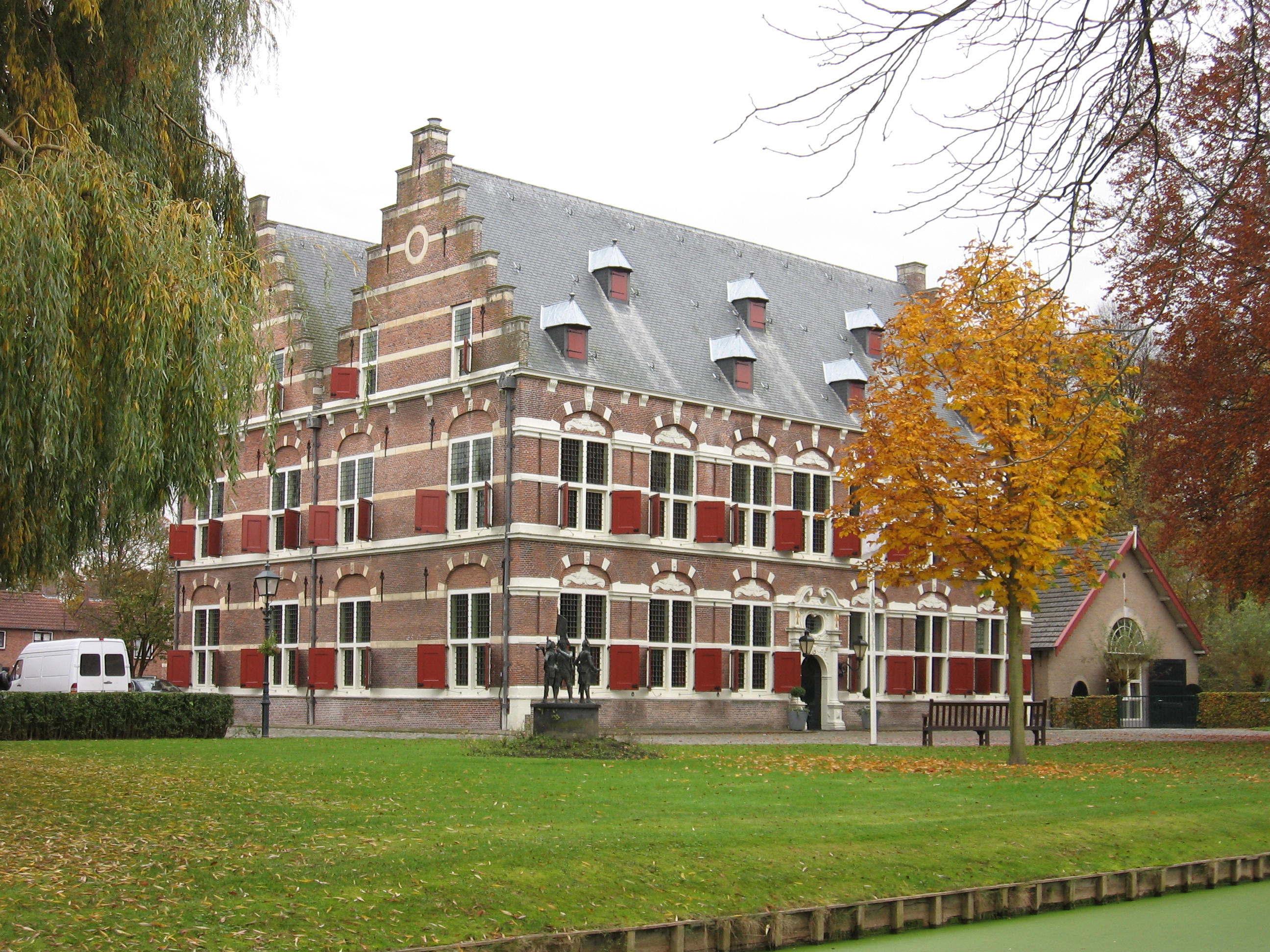 Zicht op een deel van het Mauritshuis in Willemstad